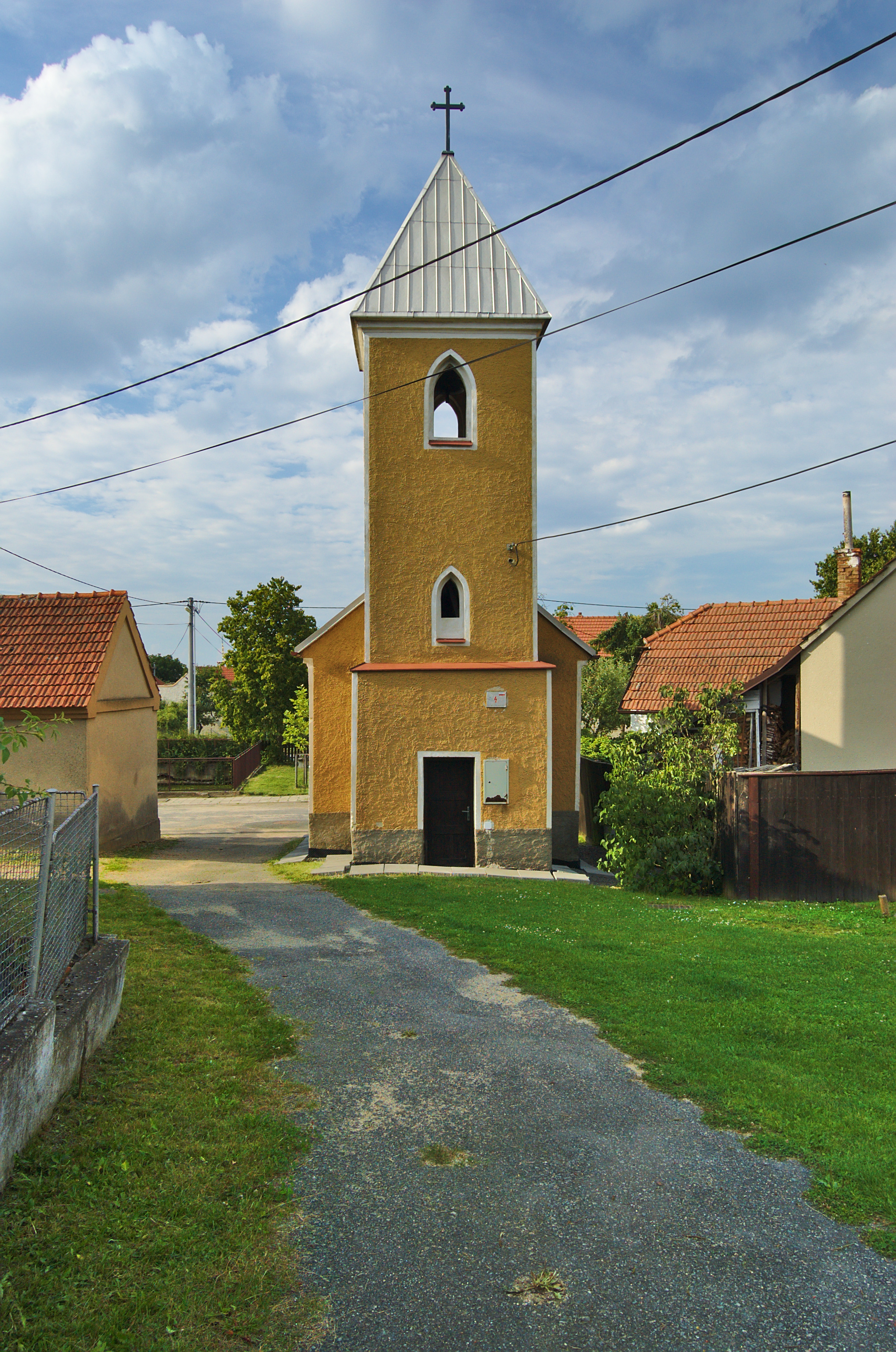 Kaple svatého Cyrila a Metoděje, Ludíkov, okres Blansko